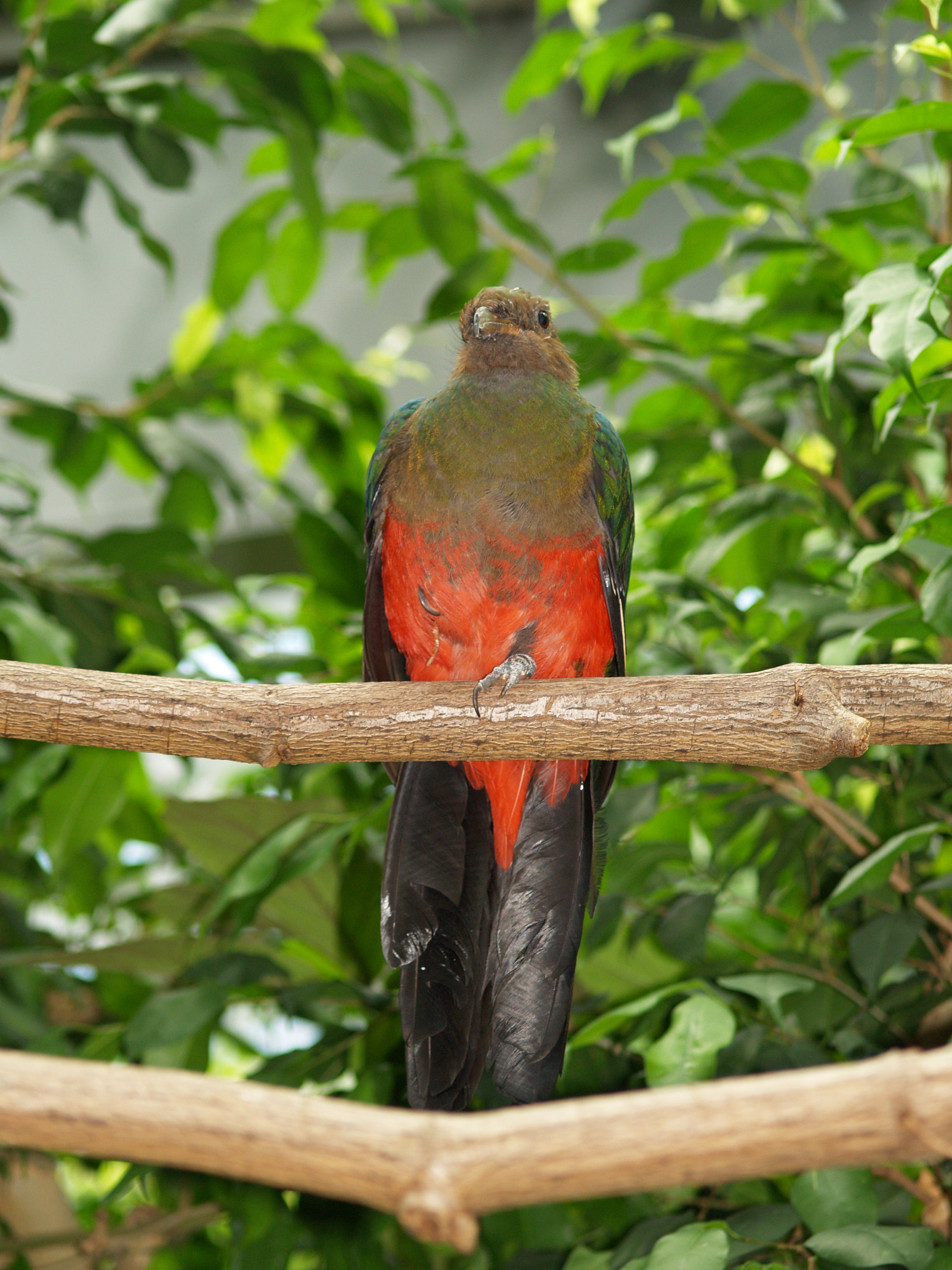 Ein Goldkopftrogon (Pharomachrus auriceps). Aufgenommen im Zoo Zürich.